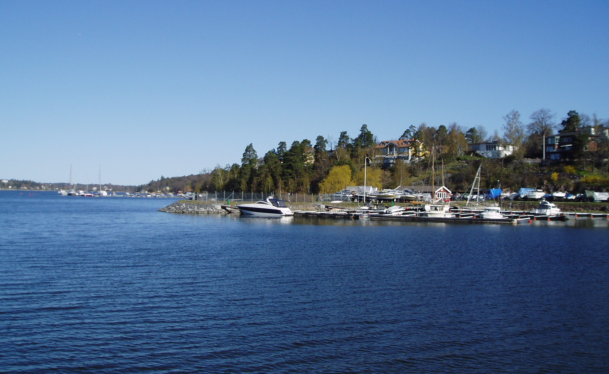 Lidingö, båthamn i Islingeviken